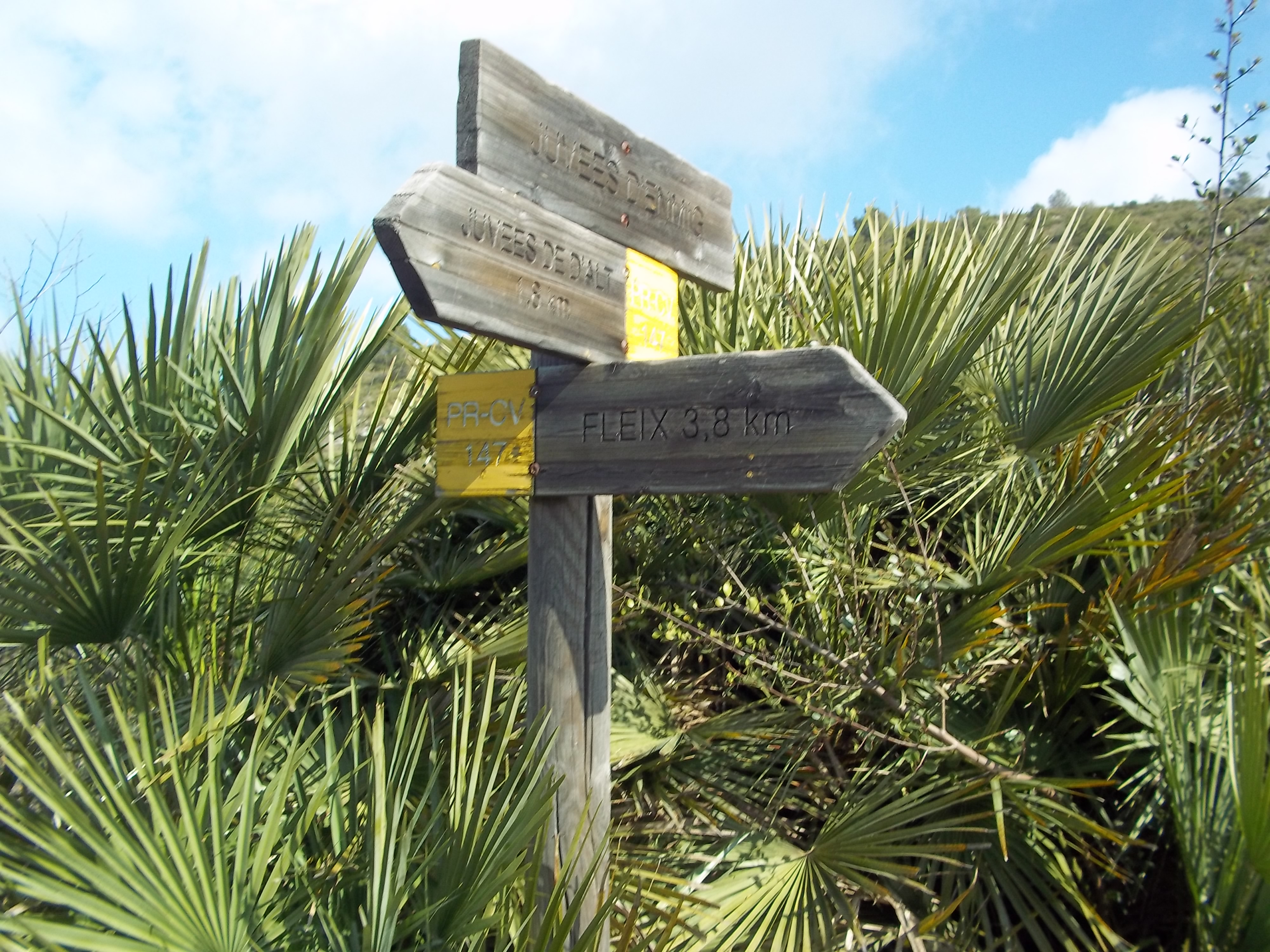 Diversos detalls del Barranc de l'Infern a la Vall de Laguar